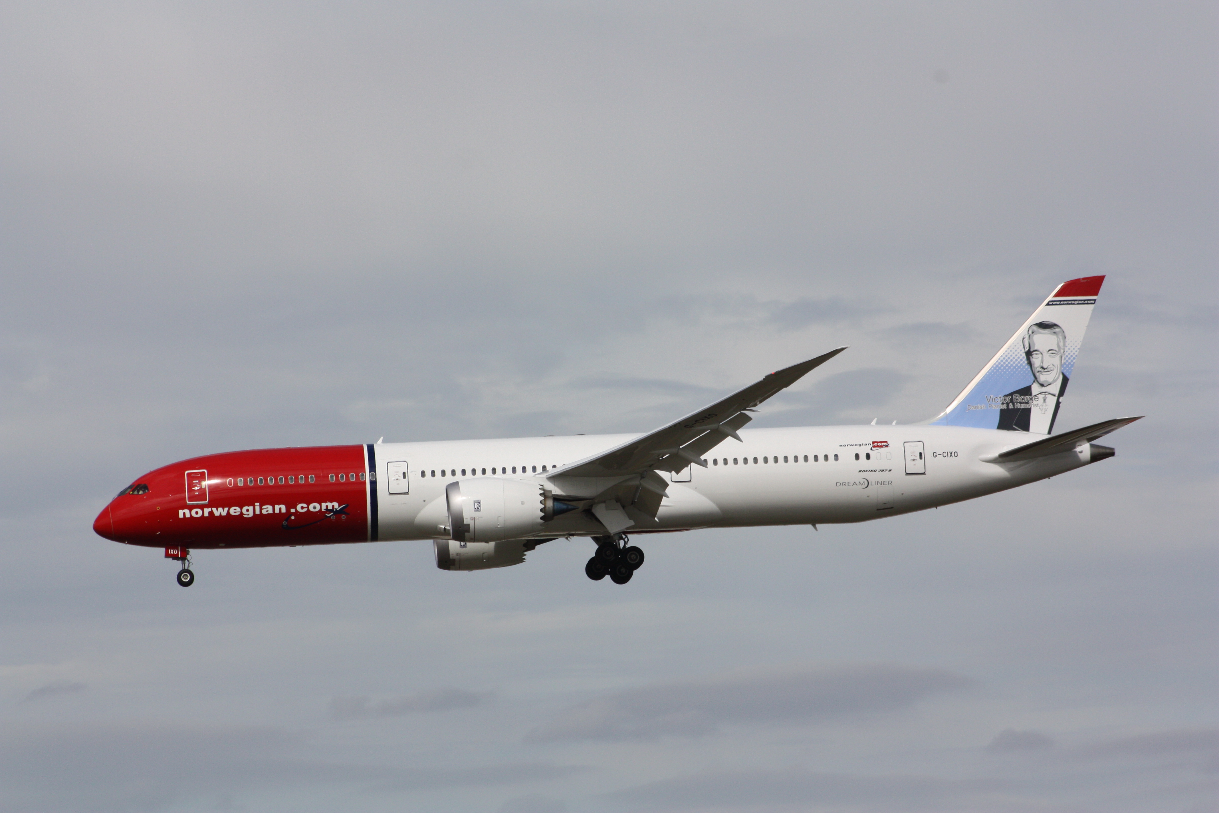 G-CIXO Gatwick 12/09/2016